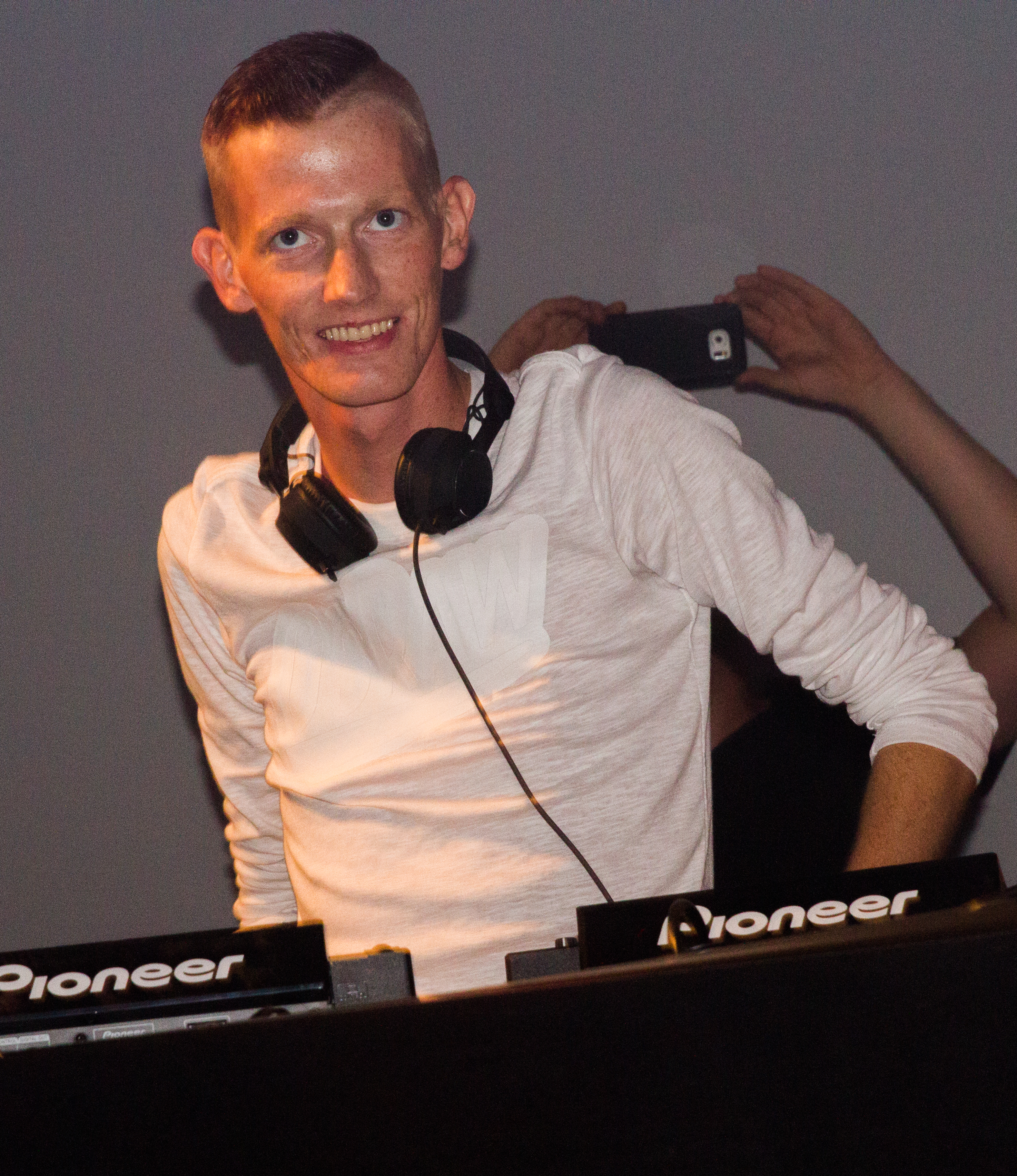 Gestoert aber GeiL beim 14. Airbeat-One Dance Festivals das vom 16. bis 19. Juli 2015 auf dem Flugplatz Neustadt-Glewe.